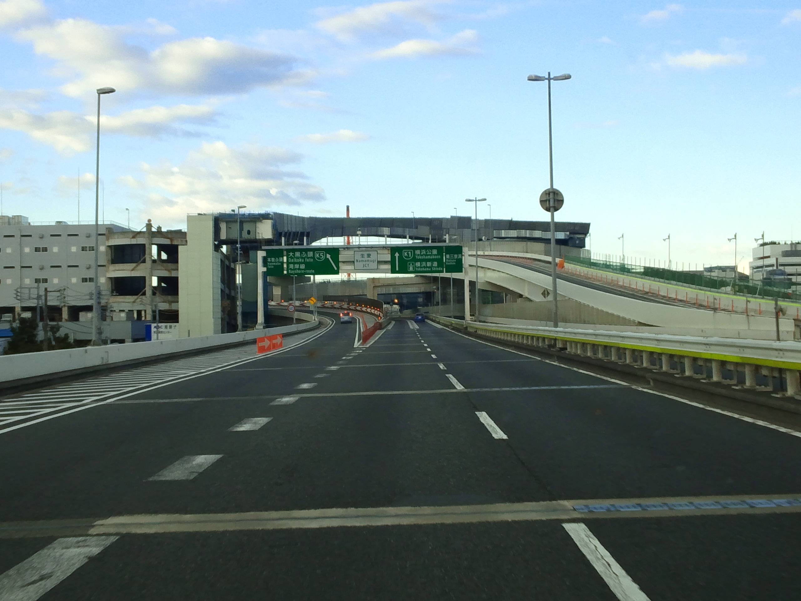 首都高速道路神奈川1号横羽線生麦JCT（金港JCT方面側分流付近）